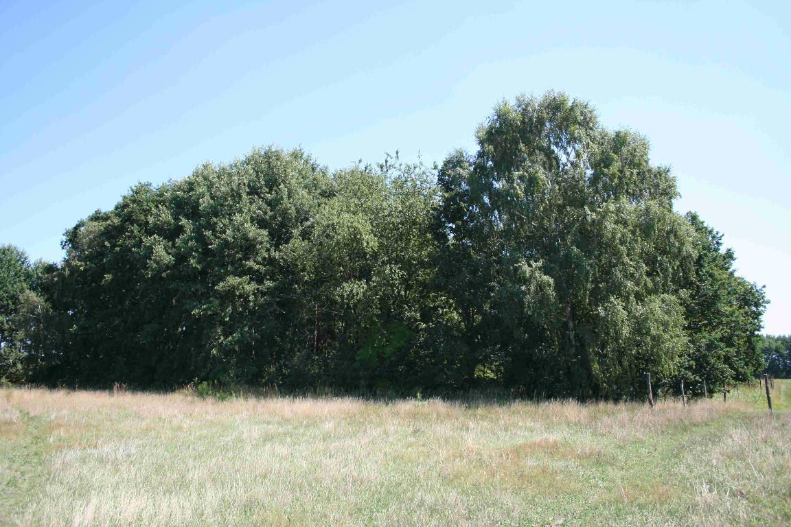 Burgwall im Sommer